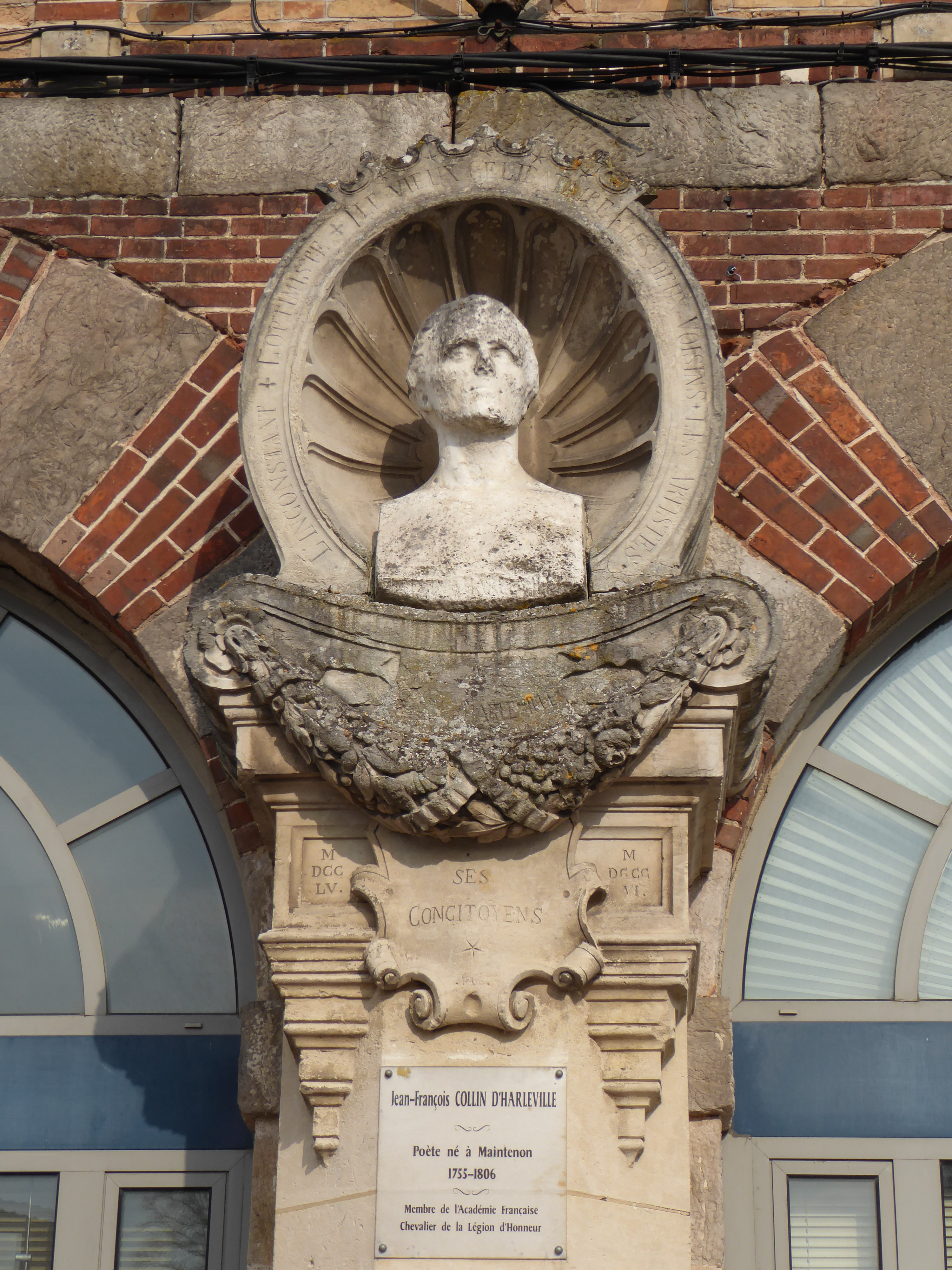 buste de Collin d'Harleville en façade de l'ancien hôtel de ville de Maintenon, Eure-et-Loir, France.